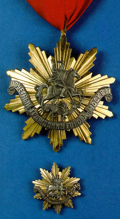 Знак почетного гражданина города Москвы (основной и уменьшенная копия).